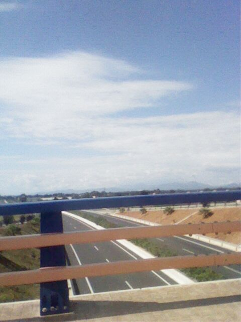 La Autovía de Manacor vista desde la Ma-15